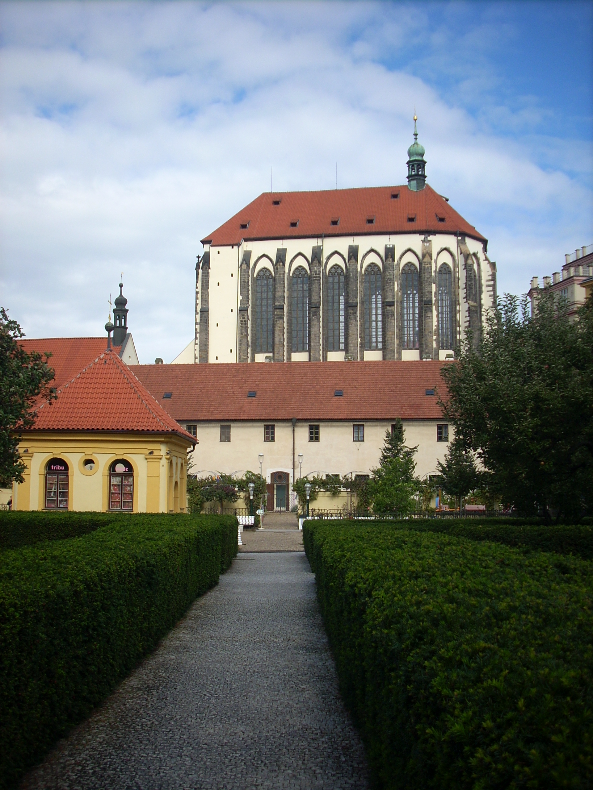 Klášter františkánský, Praha 1, Jungmannovo nám. 751/18, Nové Město